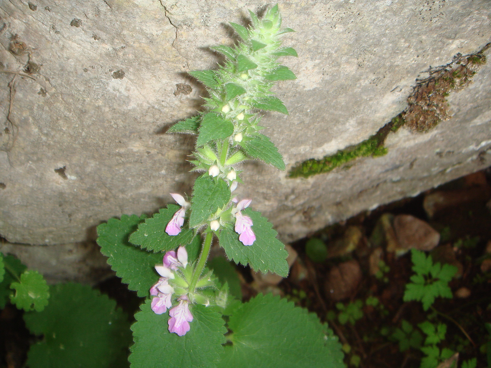 (Stachys circinata), Grazalema, Cádiz, España.